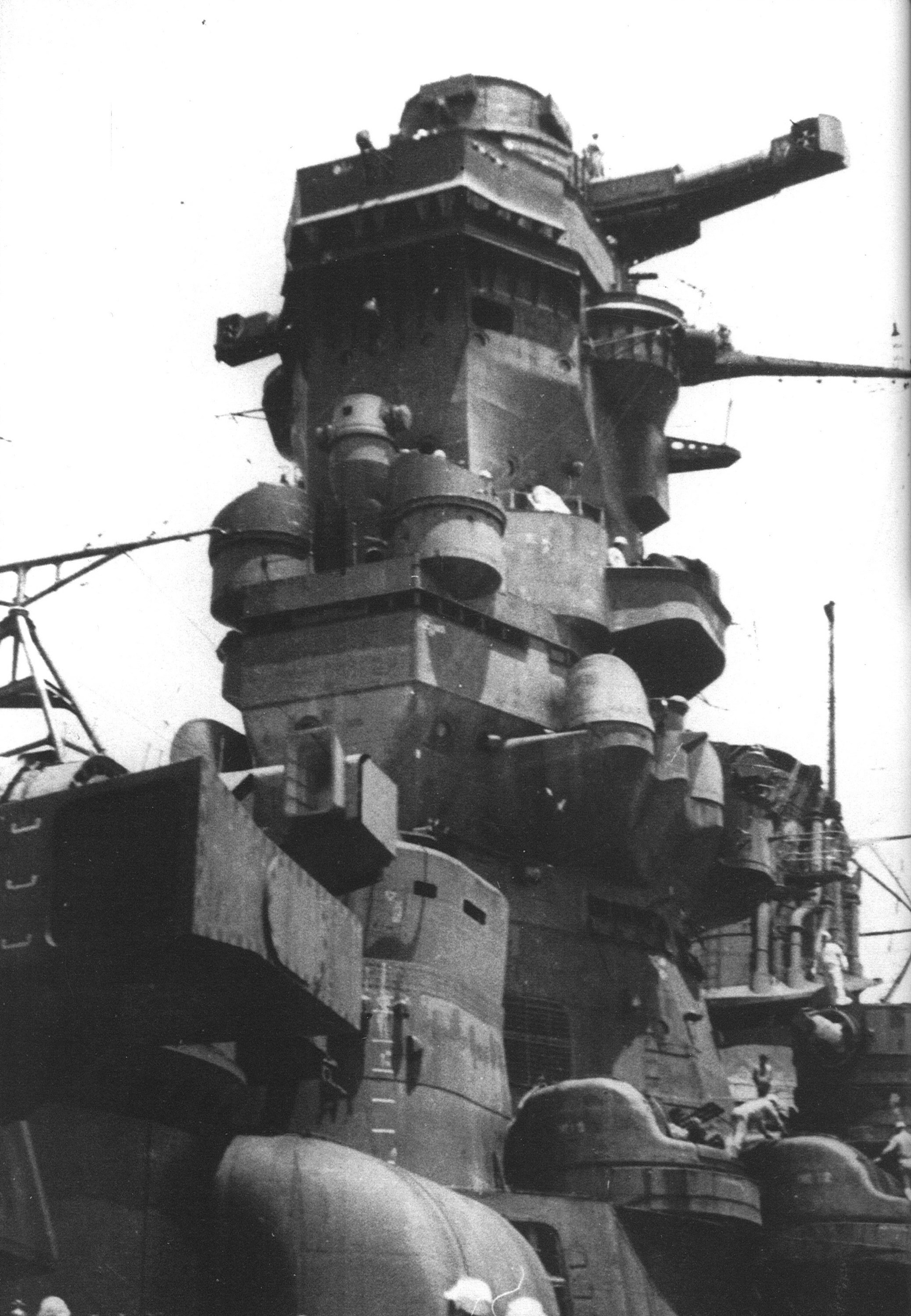 1942年6-7月、徳山-呉間で航試運転中の武蔵艦橋。